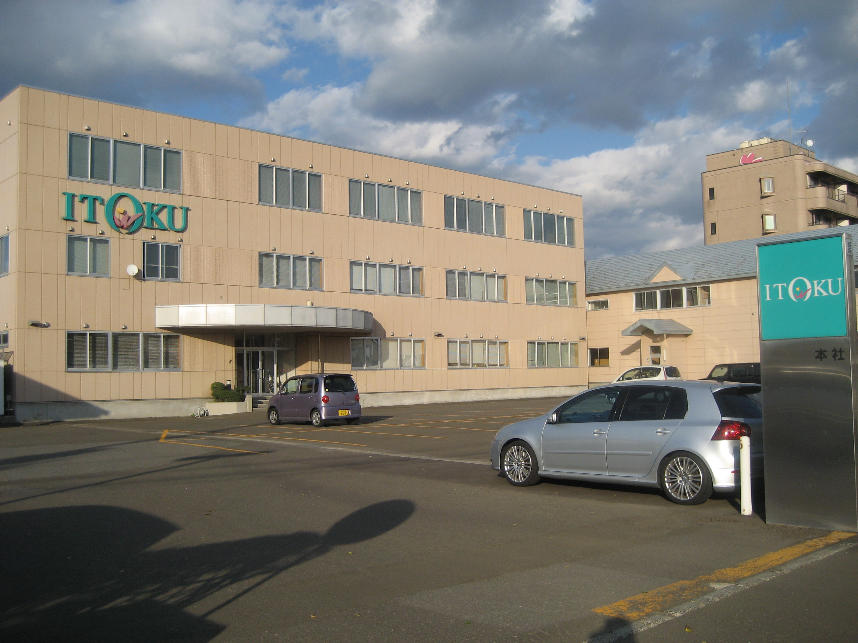 秋田県大館市にある いとく本社